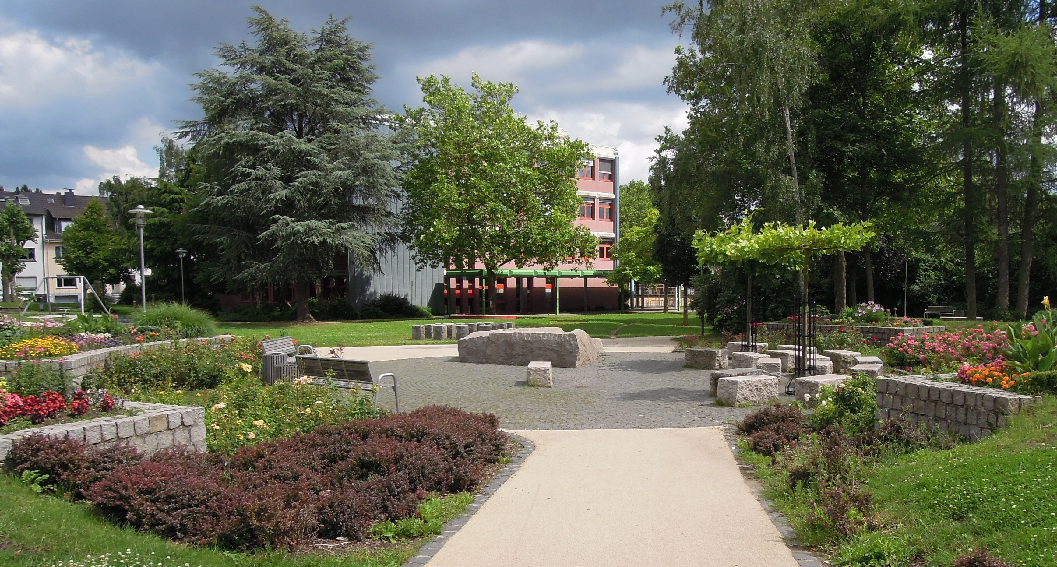 Quellstein-Brunnen (Paul Schneider) auf dem Platz des 23. Oktober (Rosengarten)